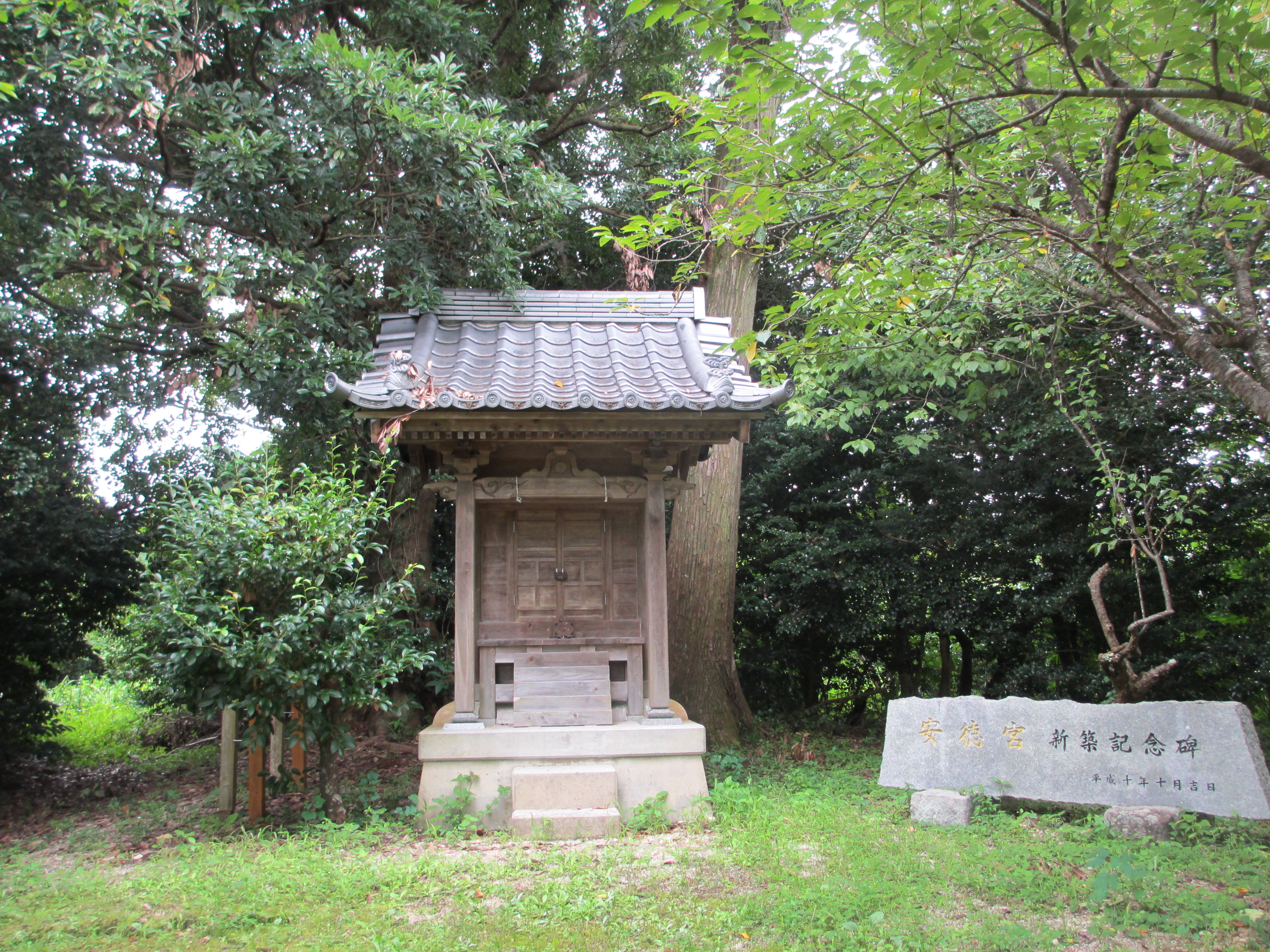 那珂川市大字安徳36新幹線博多南駅安徳館公民館左上る原田種直御招き